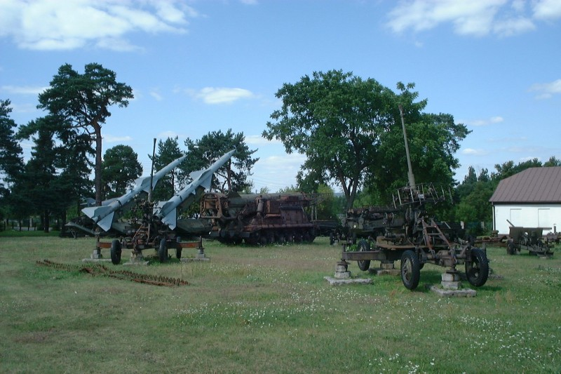 Poland, Skarzysko-Kamienna, Museum of Arms.